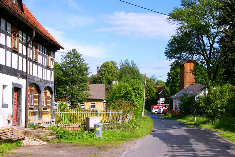 Václavice u Hrádku nad Nisou